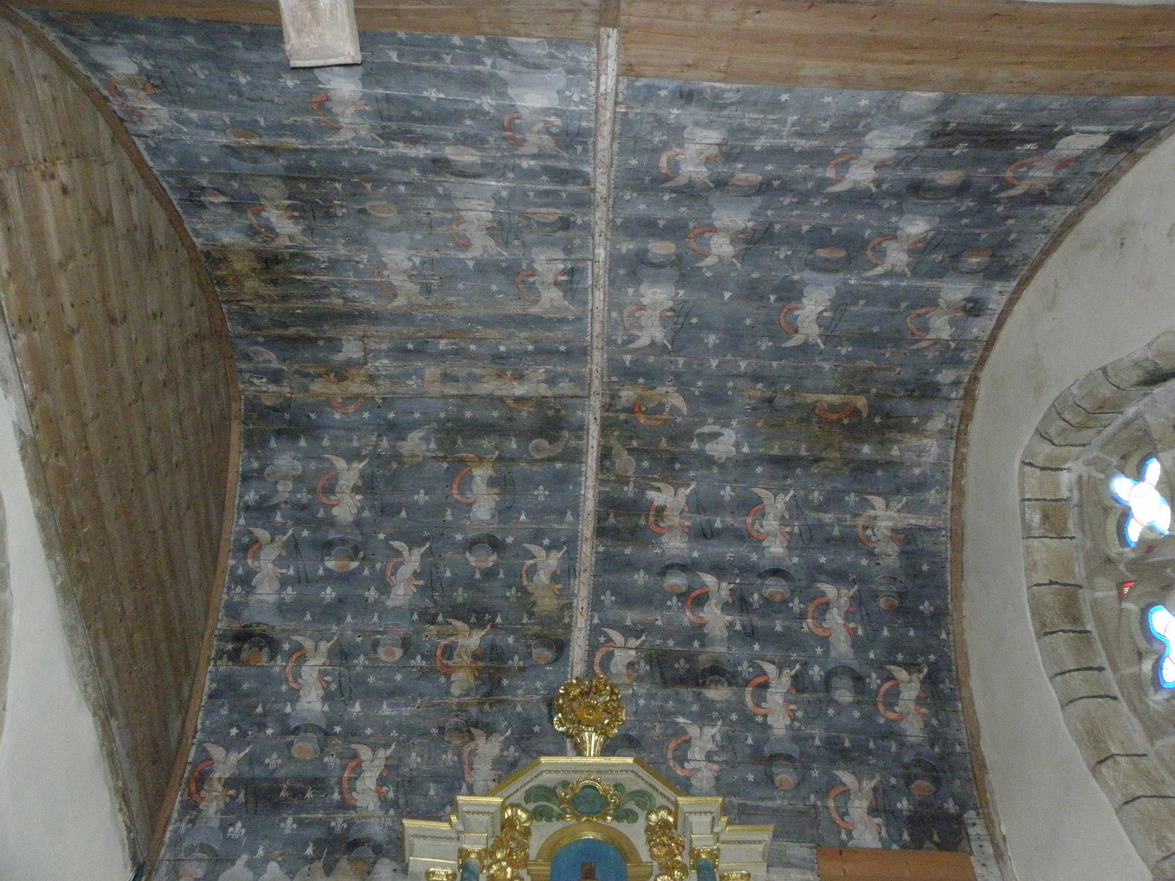 Douvis de la chapelle de la Vierge de l'église Notre-Dame de Runan (22). .